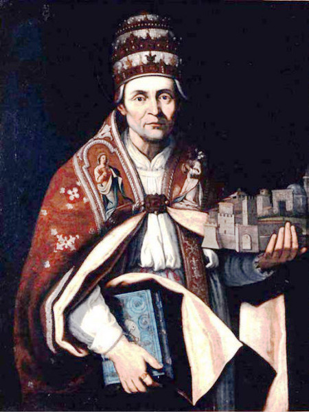 Papa Celestino V - dipinto di Giulio Cesare Bedeschini (? XVI secolo – L'Aquila, 1640). Museo de L'Aquila, Italia Autorizzazione 1° immagine